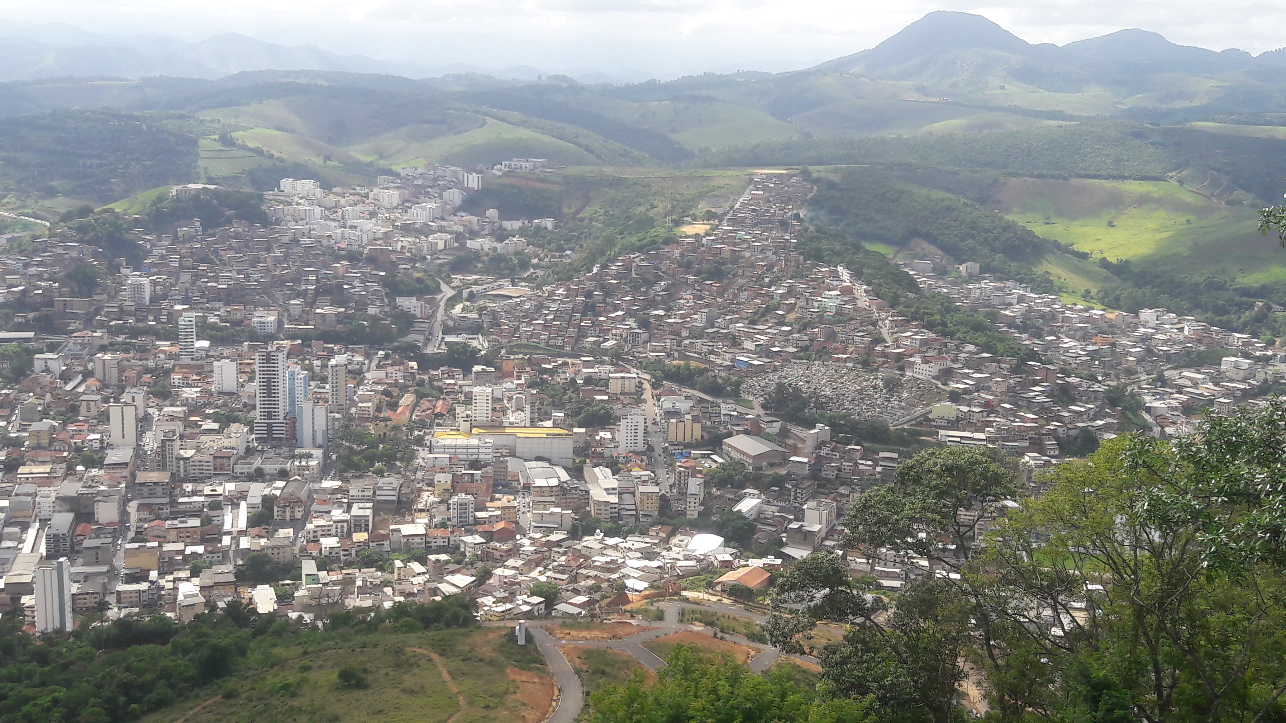 Centro da Cidade, Alfa Sul, Campo de Avião, São Vicente, São Jorge e outros bairros de Manhuaçu.